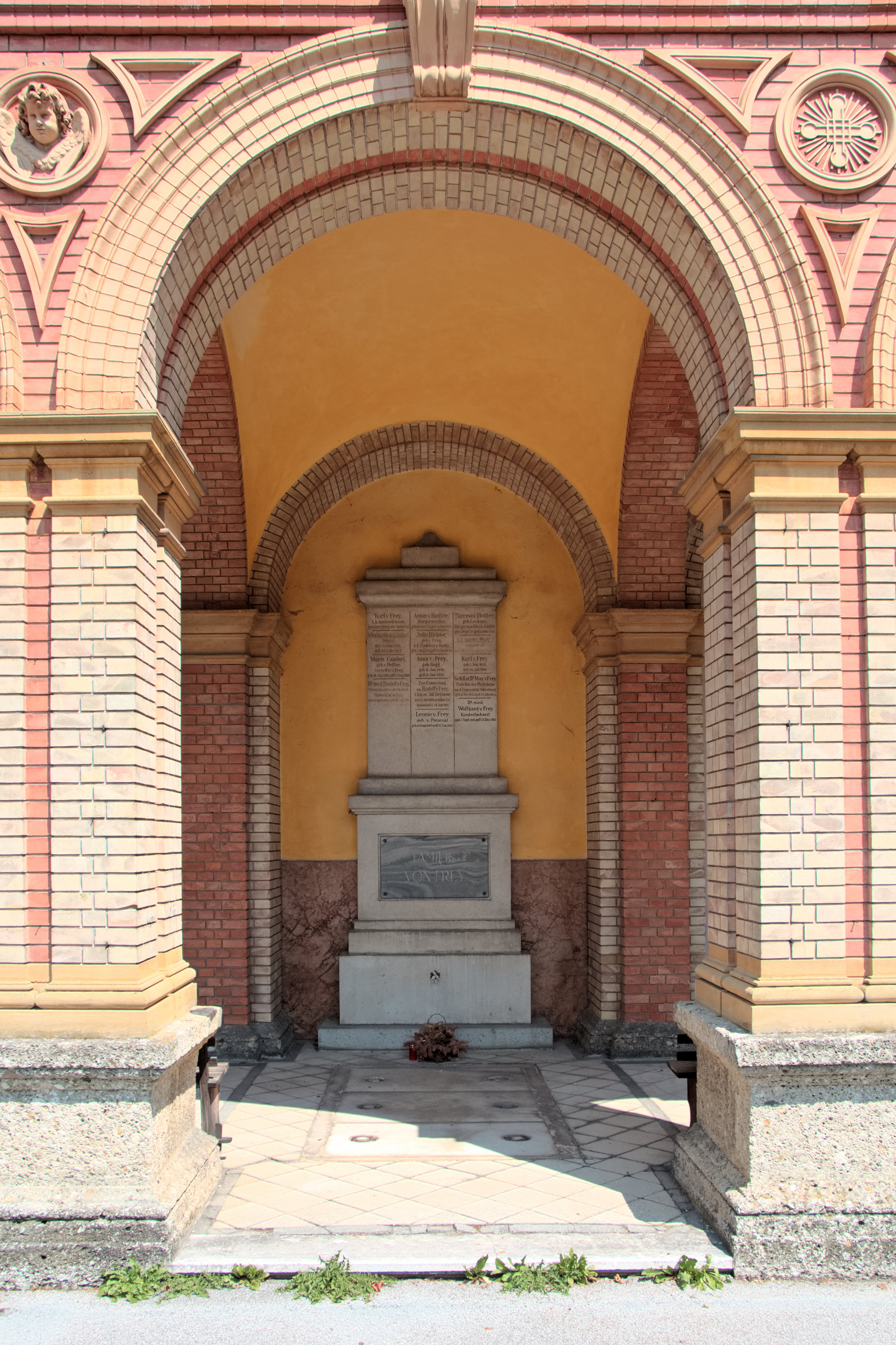 Kommunalfriedhof mit neuer und alter Aufbahrungshalle, Figurenbildstock sitzender Engel, Heldendenkmal, Eingangsbereich und Ummauerung - Grabmal der Familie Frey